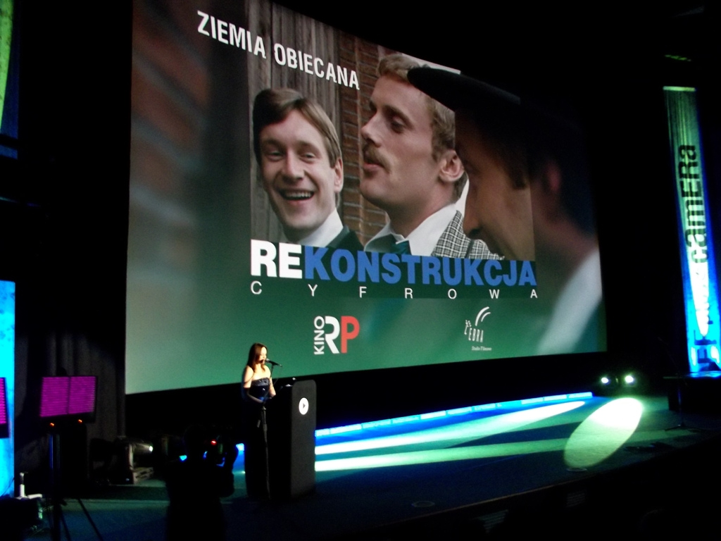 Zdjęcie zrobione podczas premiery zrekonstruowanej cyfrowo "Ziemi Obiecanej", podczas festiwalu filmowego OFF Plus Camera.